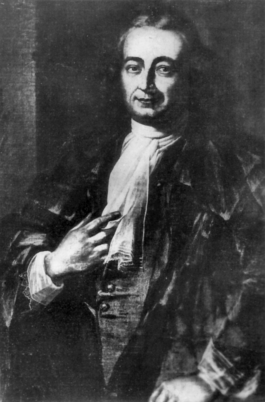 Porträt Peter von der Leyens (1697-1742)